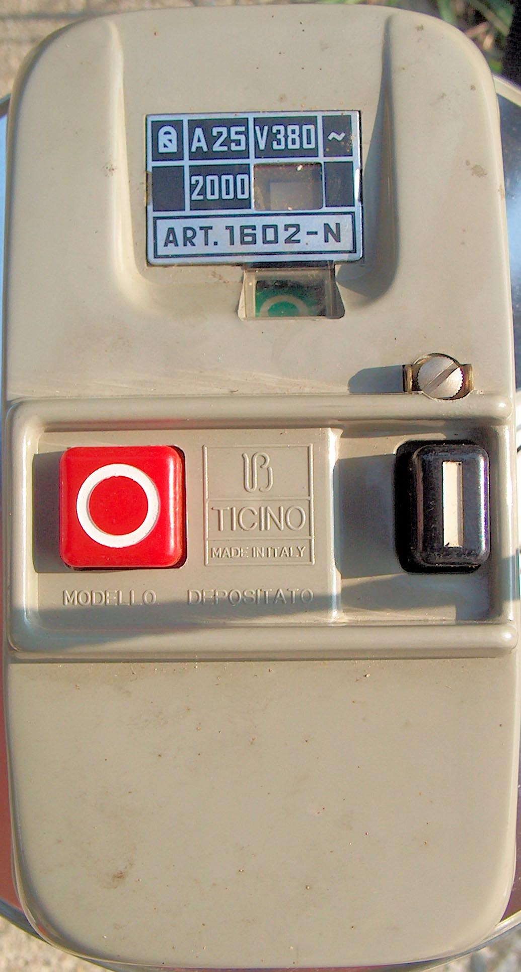 Interruttore magnetotermico in disuso